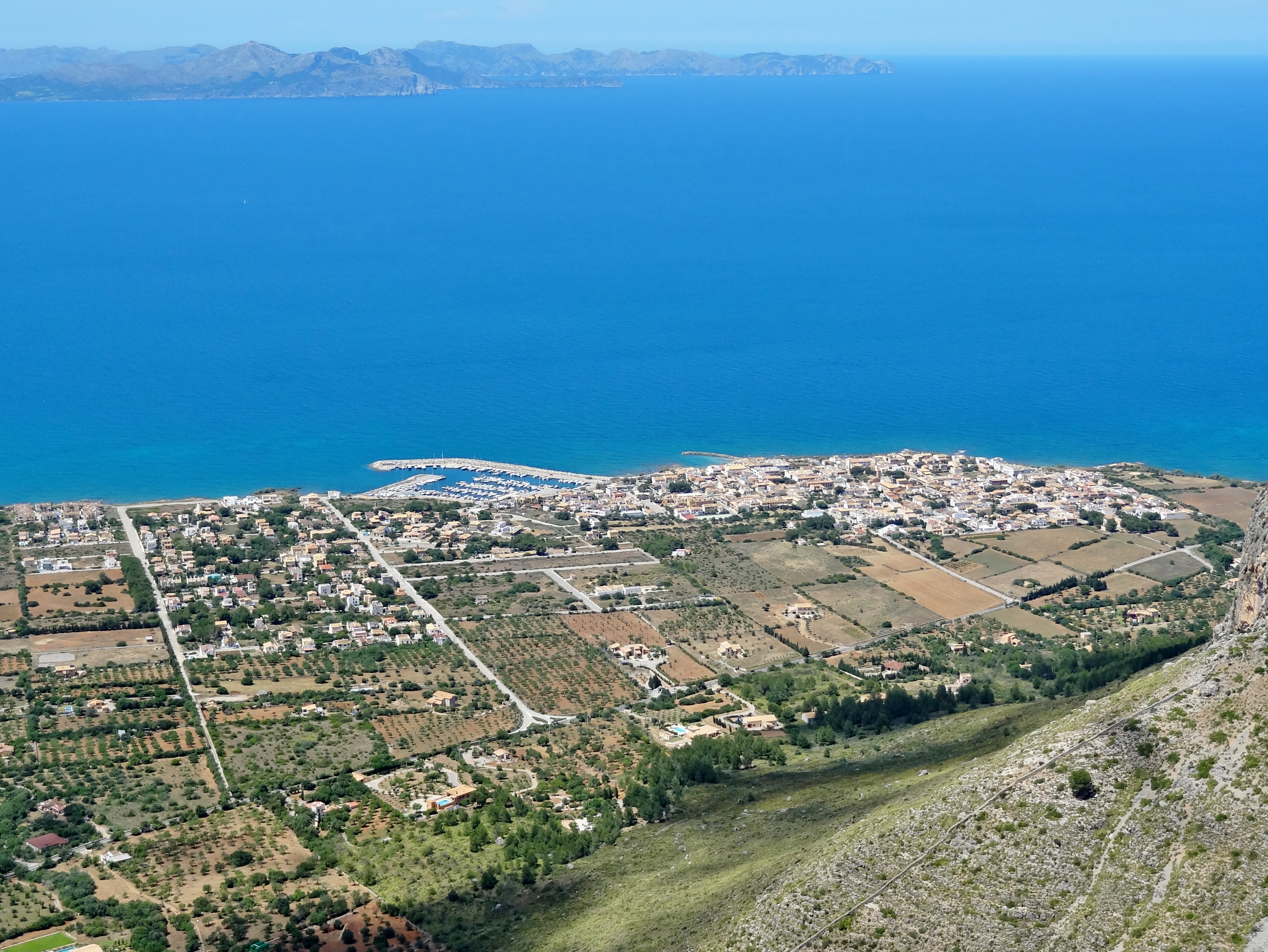 Colònia de Sant Pere in der Gemeinde Artà, Mallorca, Spanien